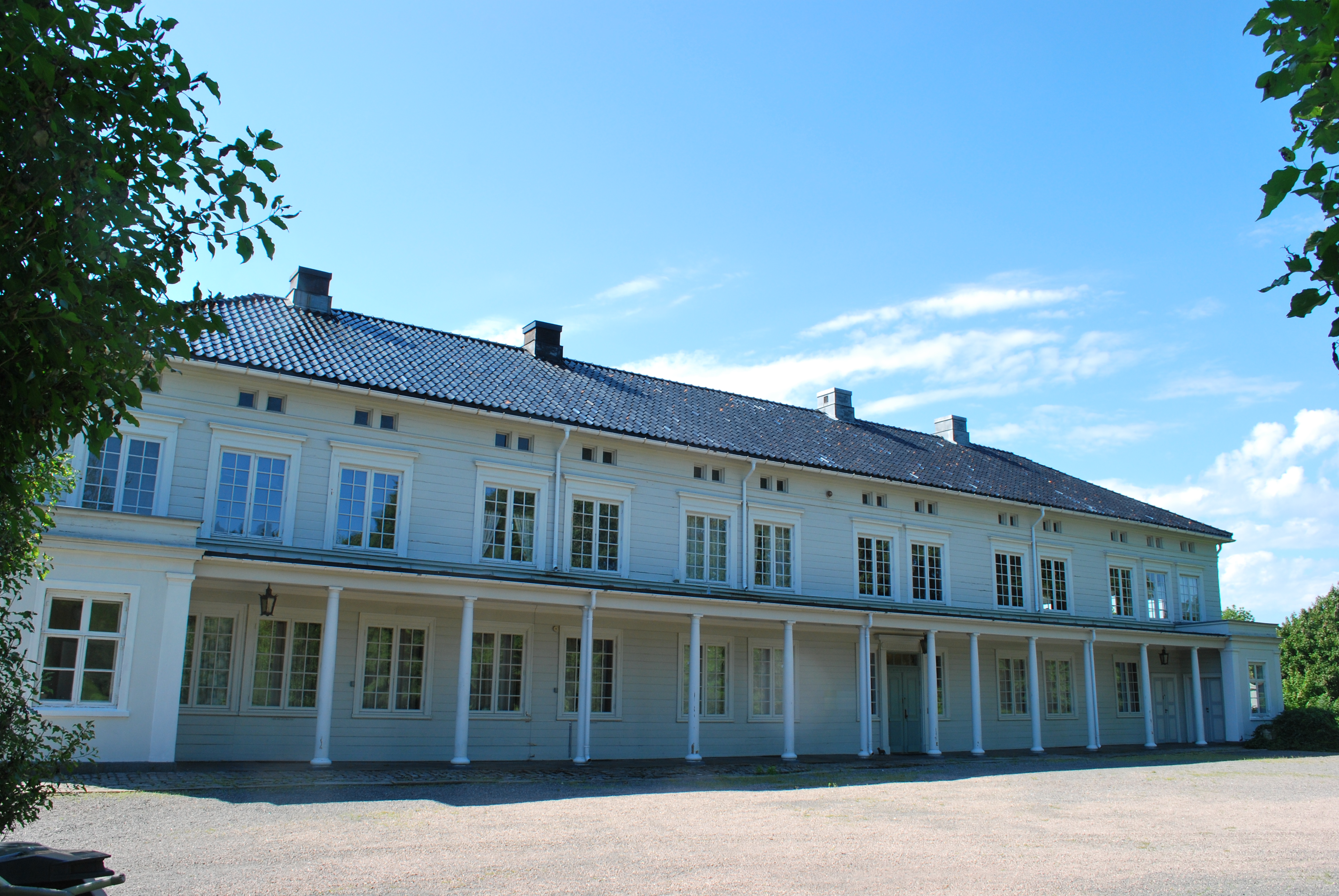 Norsk (bokmål): Linderud gård, hovedbygningen, mot nord og oppkjørselen